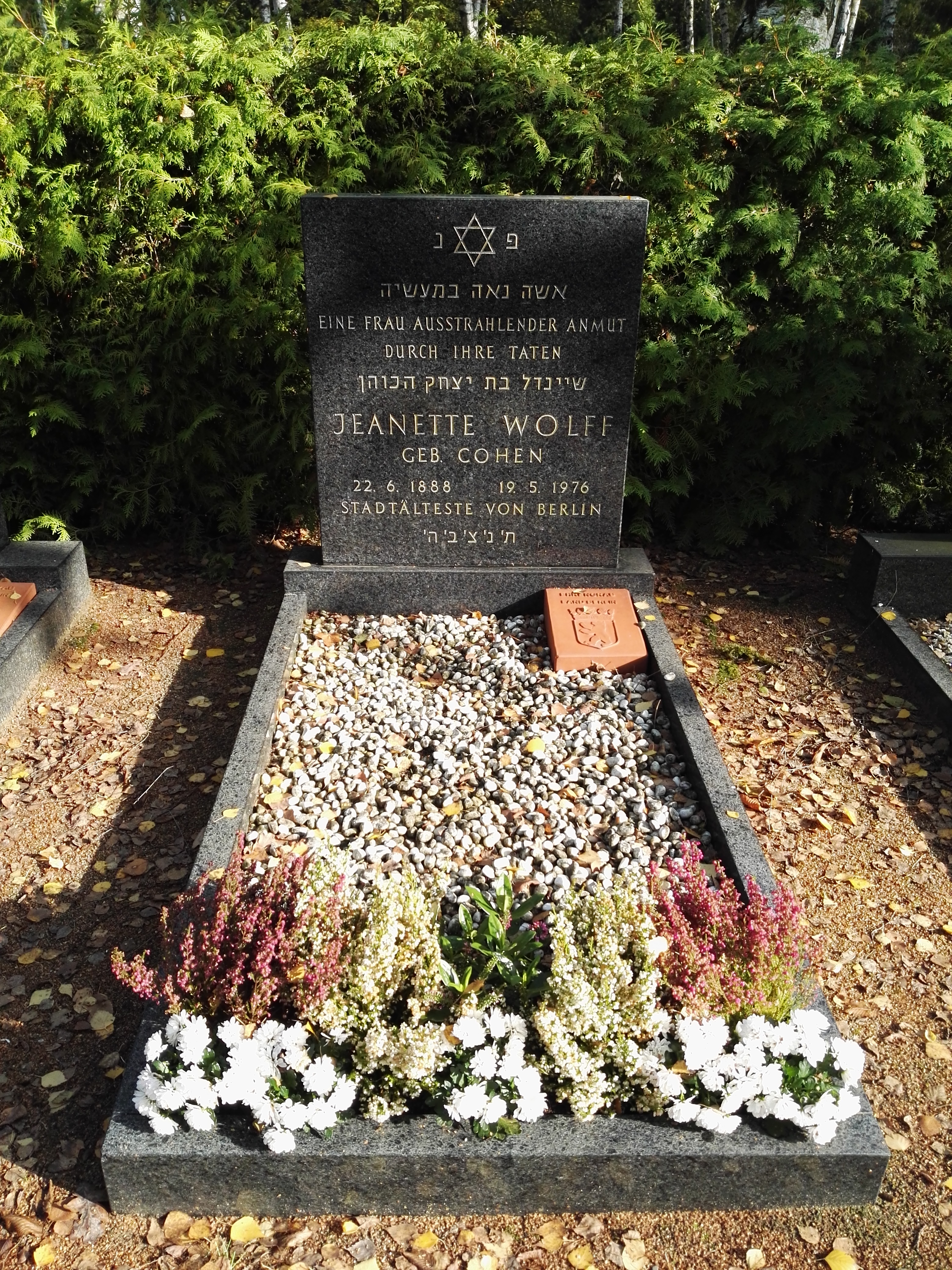 Grab von Jeanette Wolff auf dem Jüdischer Friedhof Heerstraße. Ehrengrab